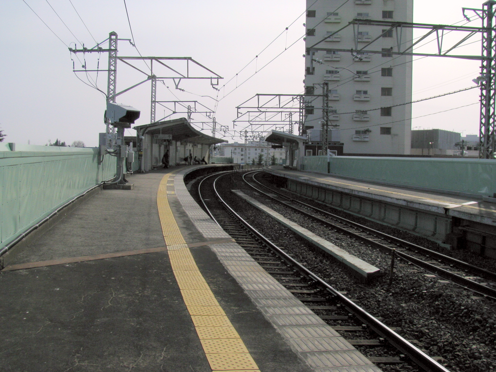 JR東日本仙石線苦竹駅